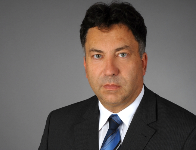 Prof. Dr. Dr. Eric Hilgendorf